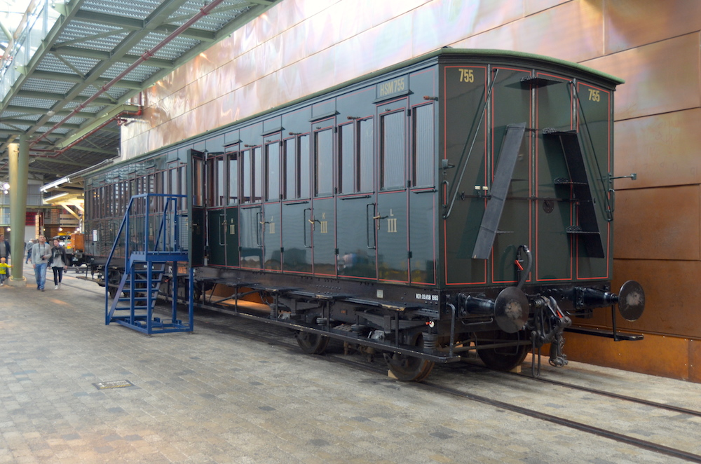 Nederlands Spoorwegmuseum rijtuig HSM C 755. Foto: Erik Swierstra.